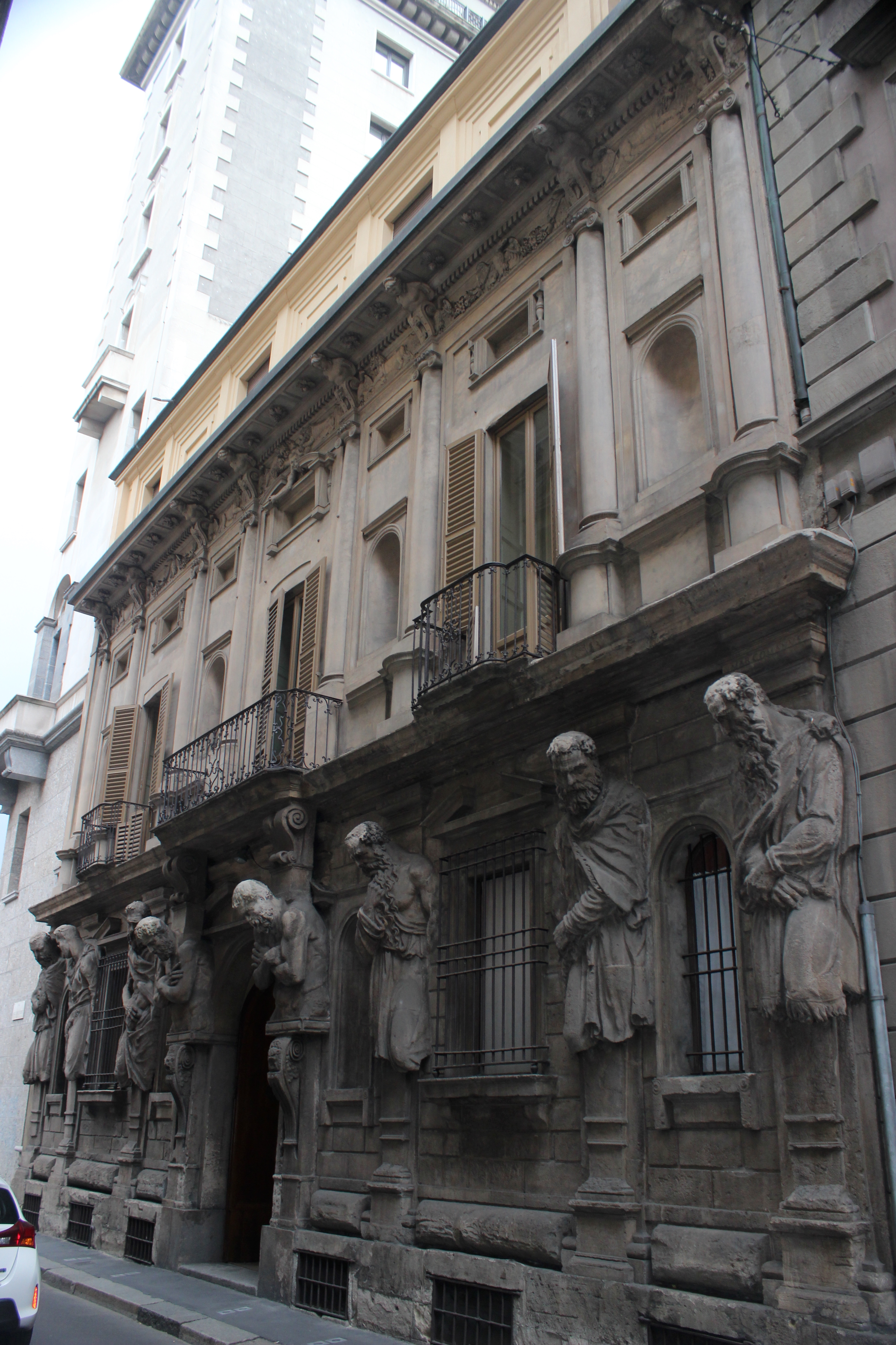 Milán. Casa degli Omenoni.